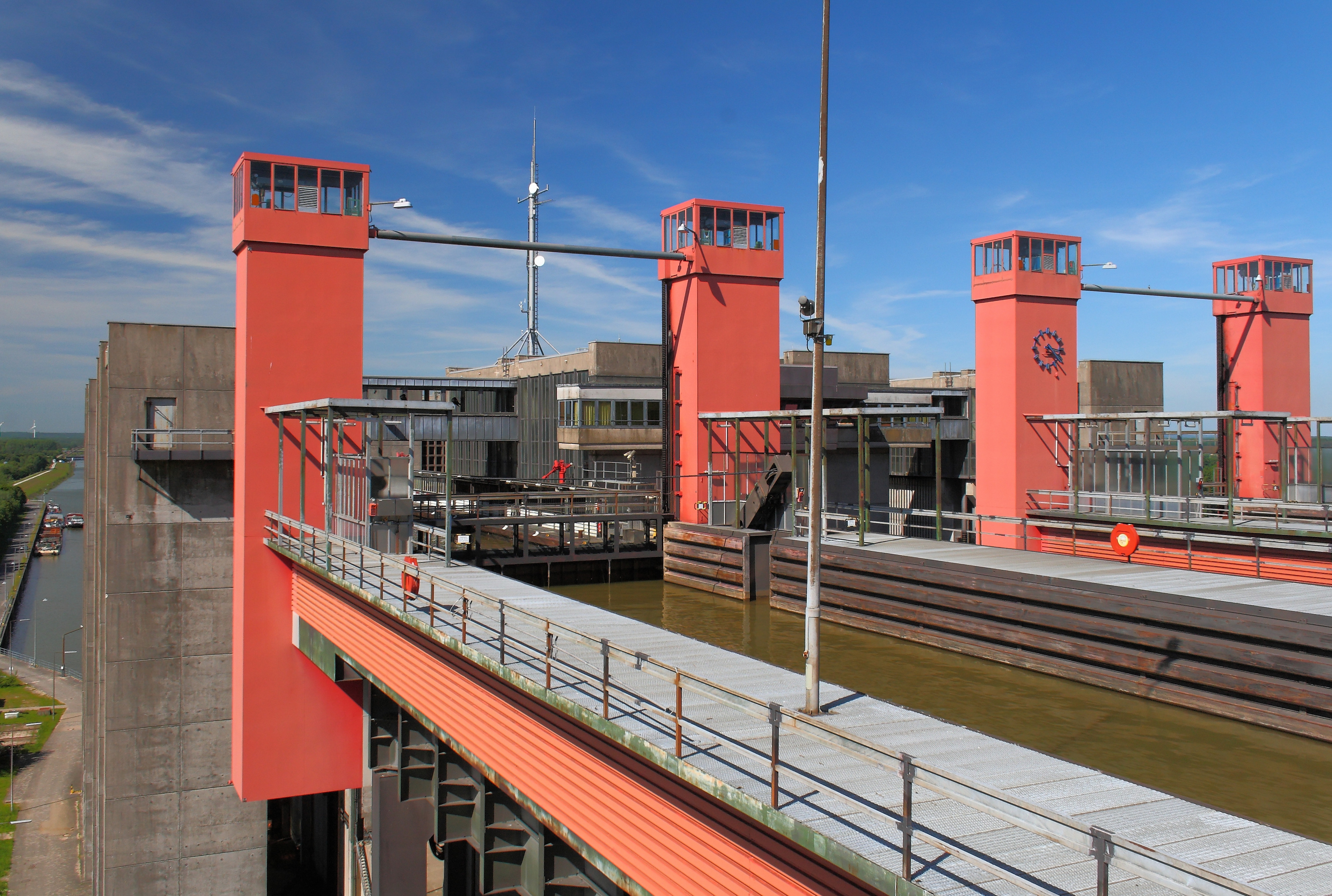 Schiffshebewerk Scharnebeck